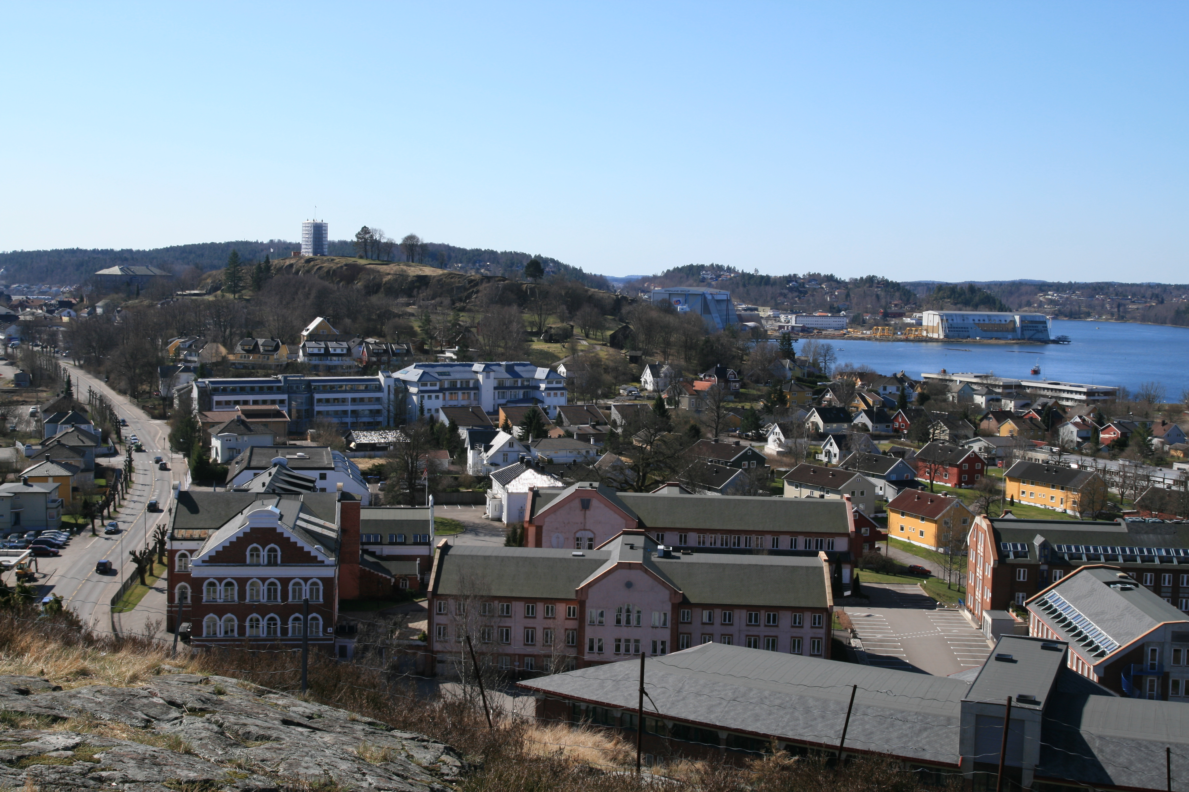 Vinteren 1201-2 kom Kong Sverre og hans Birkebeinere til Tønsberg hvor de i 20 uker beleiret Baglerne som søkte tilflukt i festningen på Slottsfjellet. I dag er det bare ruiner tilbake av det gamle kongssetet. Kanskje stod Kong Sverre selv her i Frodeåsen for å speide på Baglerne? --- In 1201-2 Tønsberg (Tunsberg in those days) were laid siege to by King Sverre as part of the power struggle between the Bagler and Birkebeiner camps. He might have stood here on Frodeåsen to get a good view of the defenses at the small but steep Slottsfjellet mountain in the middle of town.